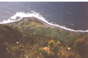 Fajã Rasa, Fica no sopé das serras do Norte da ilha de São Jorge, Açores, Portugal.